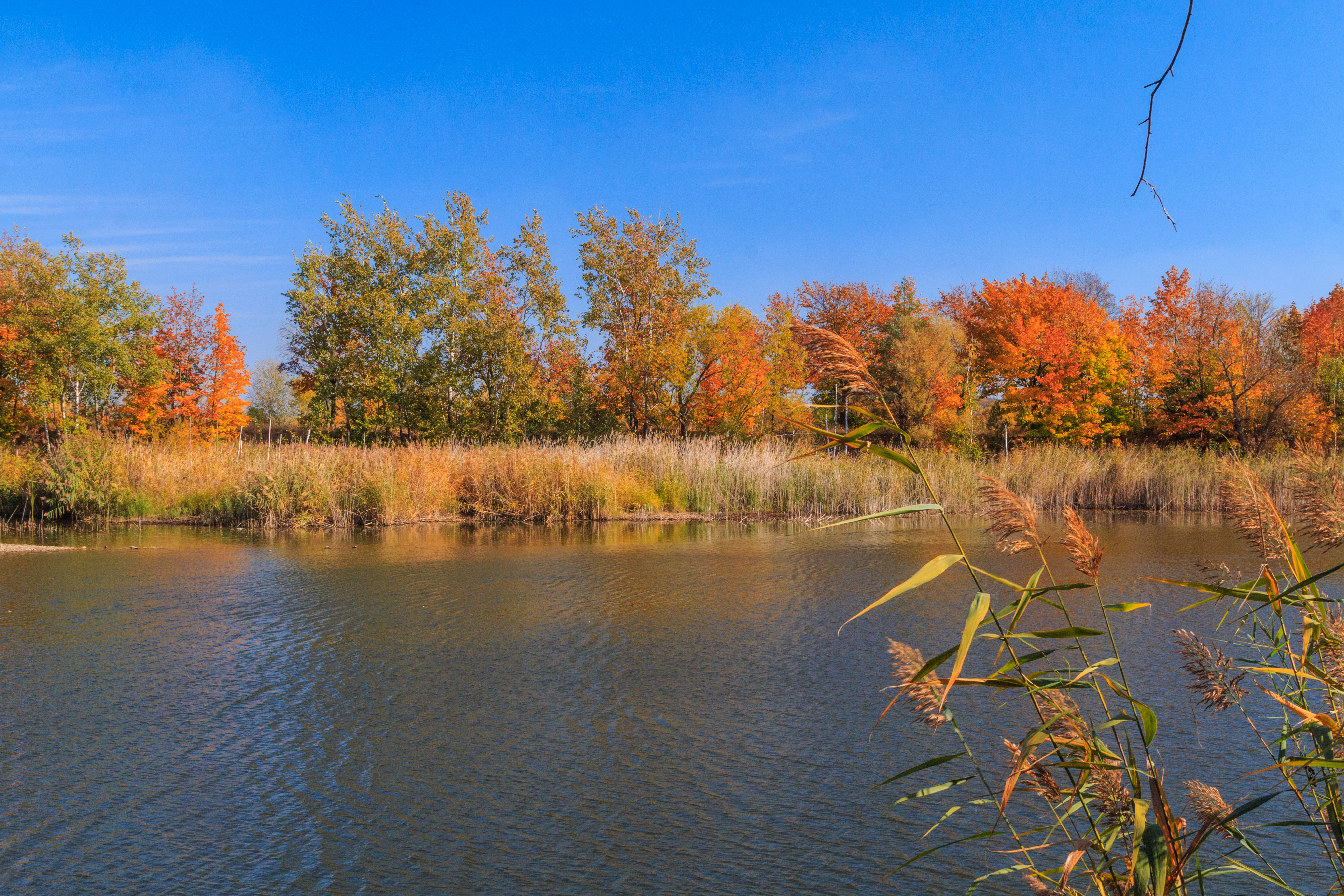 Písník Pod radary u Rusku Project: Vodstvo.